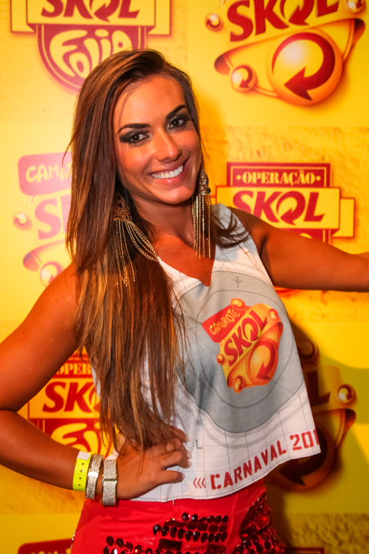 A modelo Nicole Bahls.